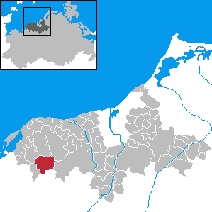 Carinerland in Mecklenburg-Western Pomerania - District Bad Doberan